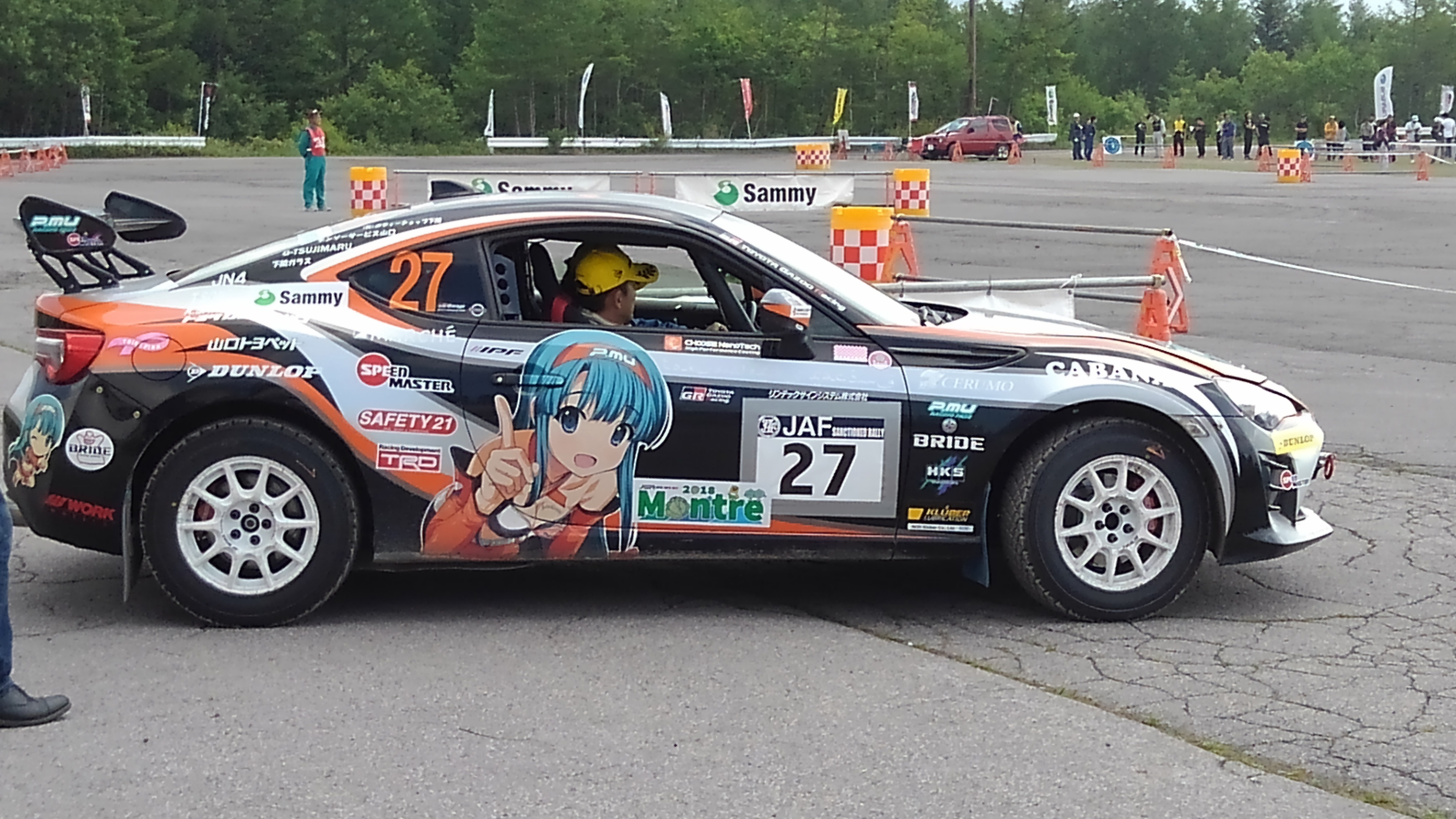 インギングのキャラクター、山口美羽の描かれた全日本ラリー選手権の86